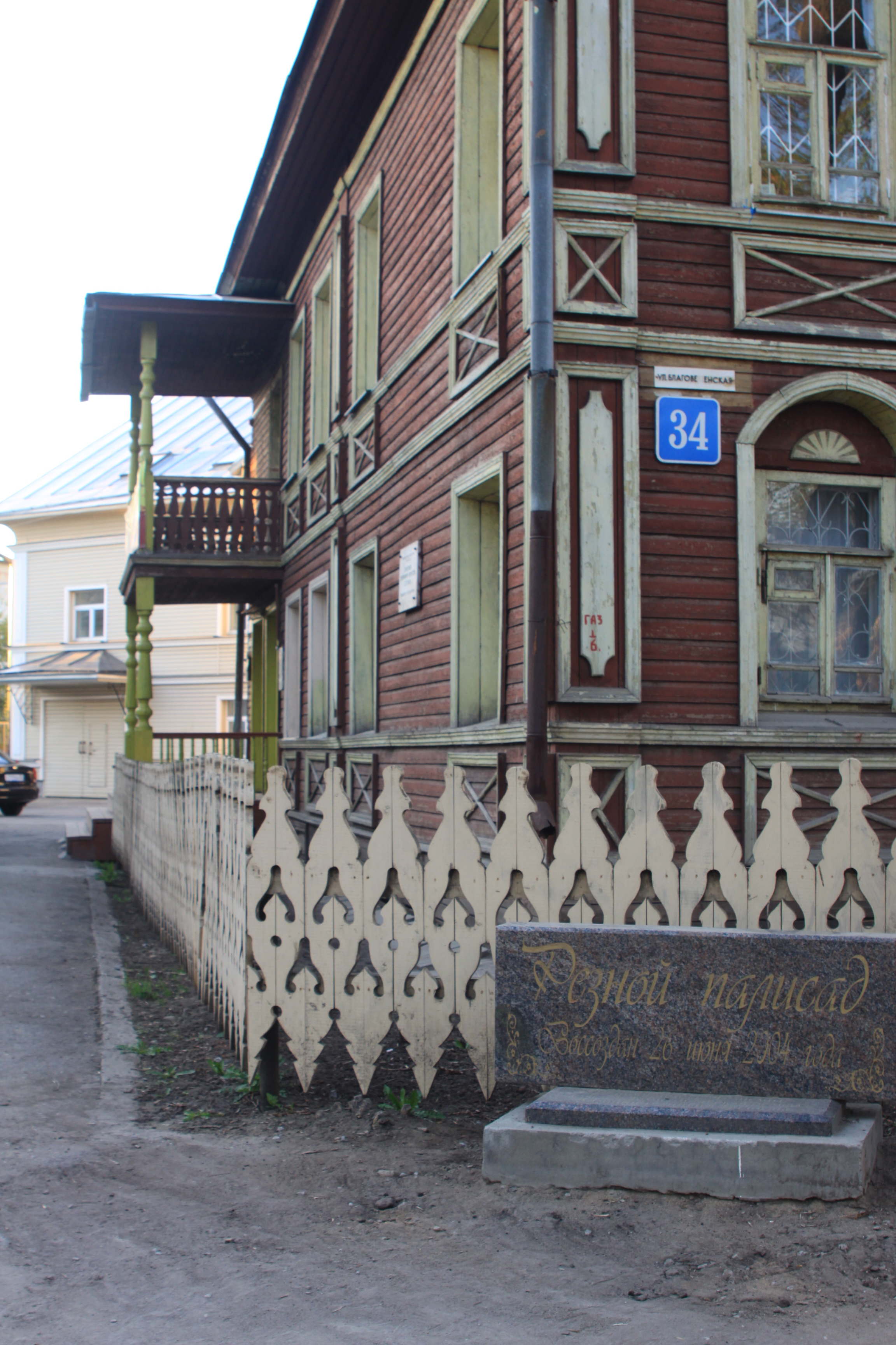 palissade en bois sculpté à Vologda